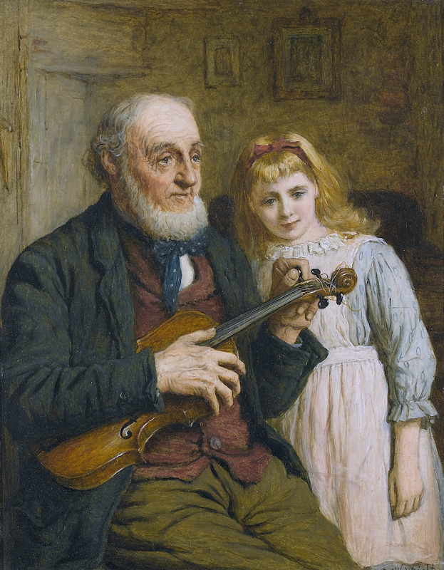 Interieur mit sitzendem Geiger und Mädchen. Öl auf Hartfaserplatte, signiert und datiert 1893 unten rechts, 25,5 x 20,5 cm